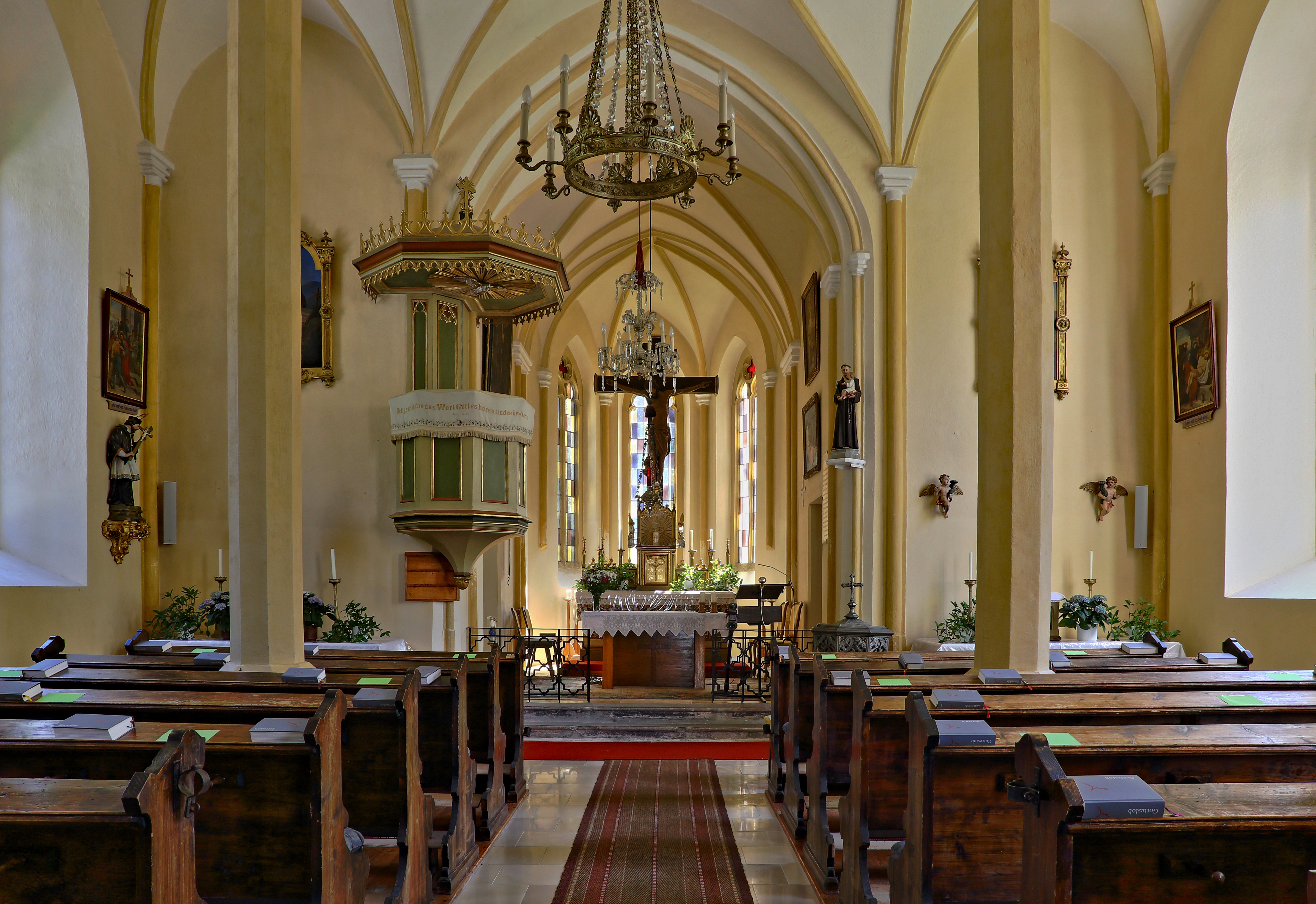 Kath. Pfarrkirche Zur Kreuzauffindung in Neuhaus am Zellerrain